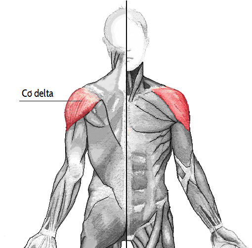 Cơ delta